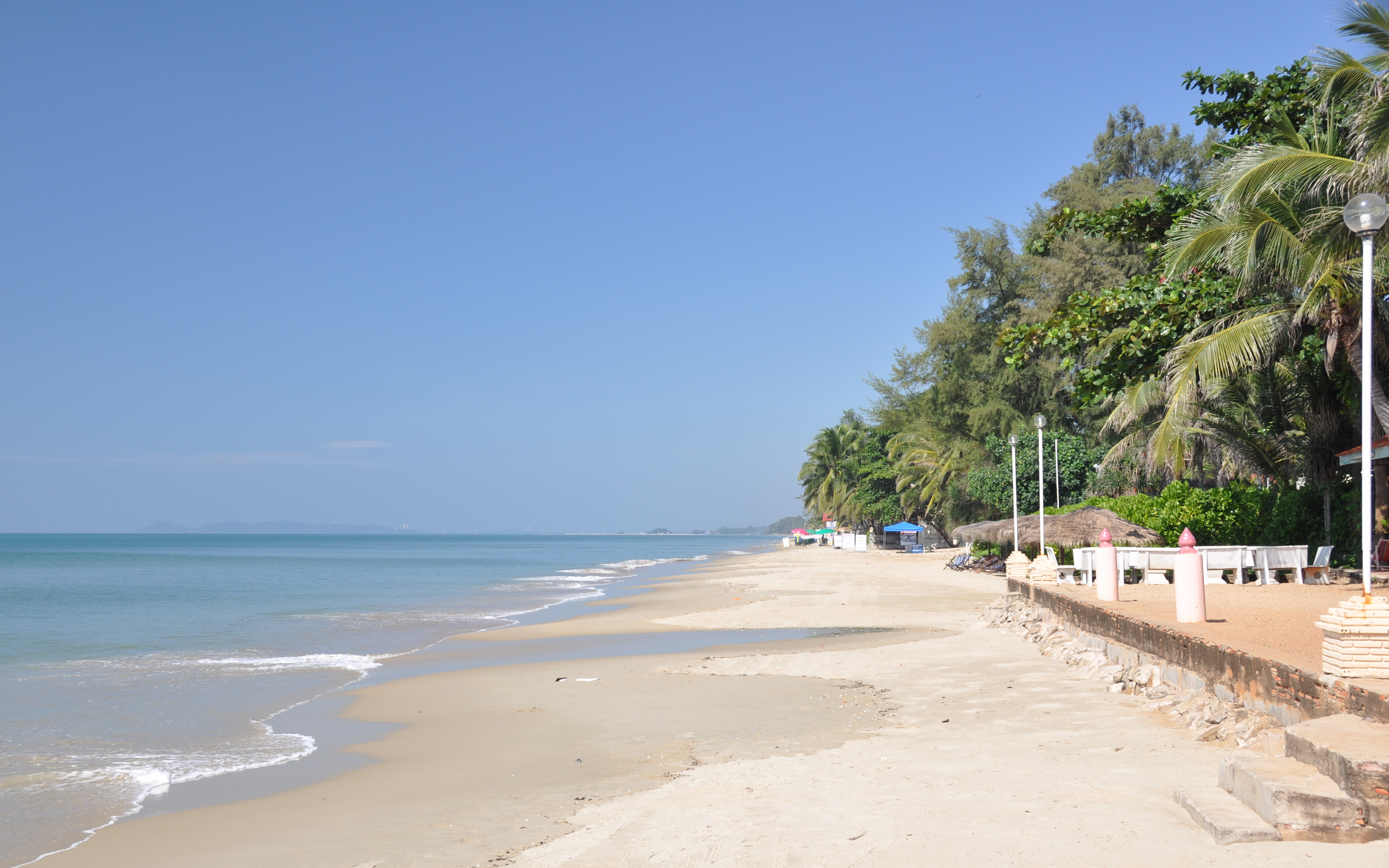 Chakphong, Klaeng District, Rayong, Thailand